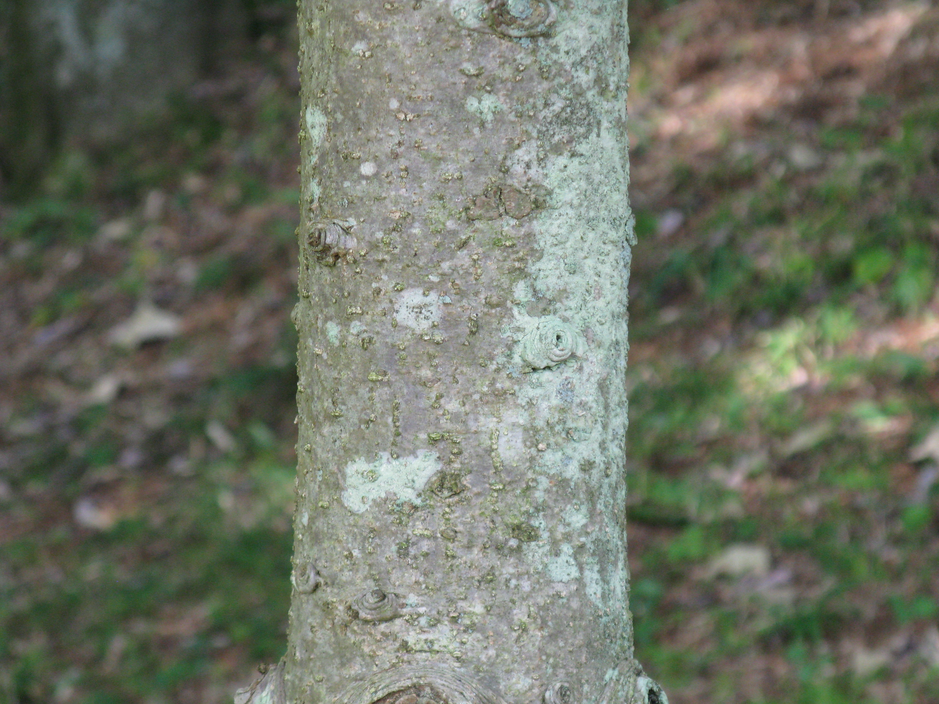 Scientific name Abies veitchii